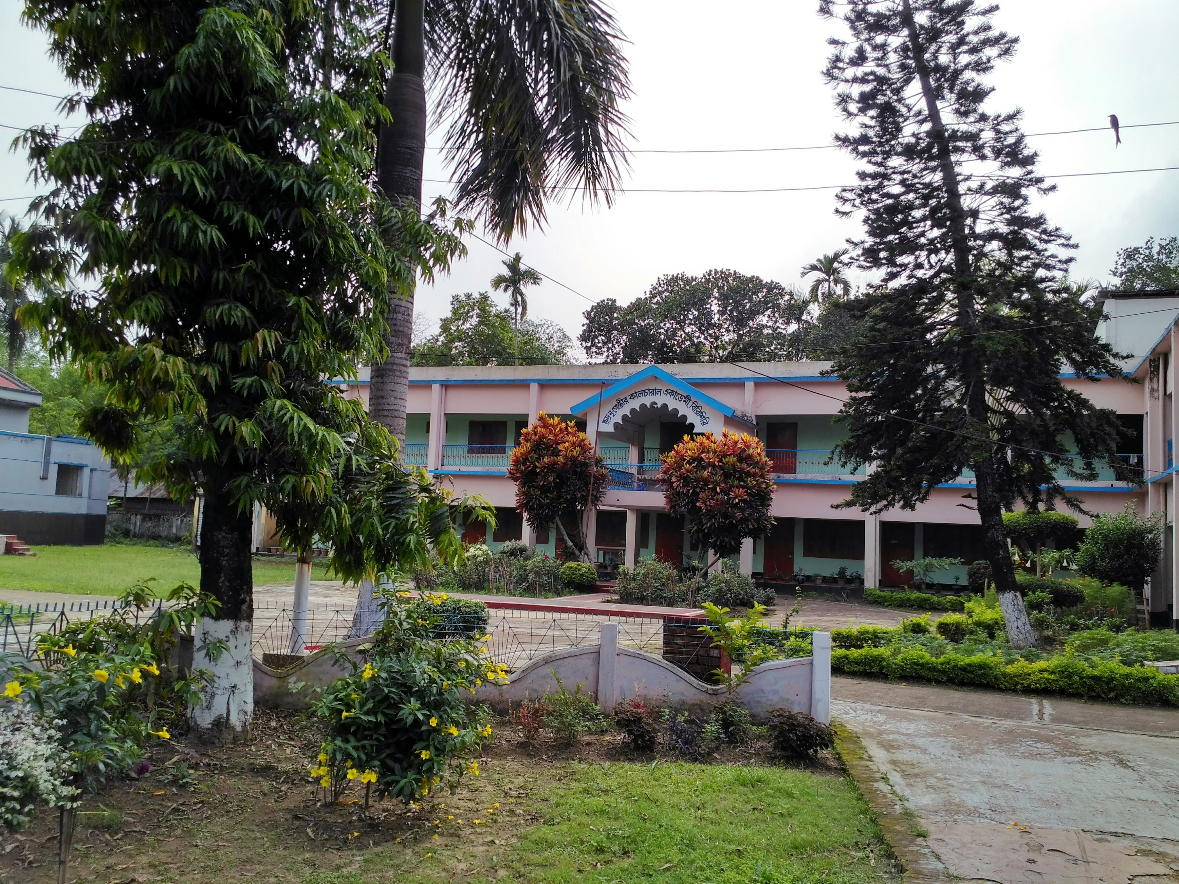 Birishiri Cultural Academy